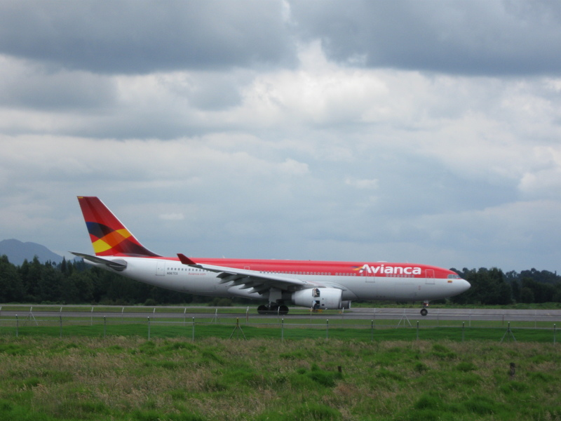 Airbus A330 de Avianca, aterrizando en el Aeropuerto Internacional El Dorado de Bogotá, Colombia.